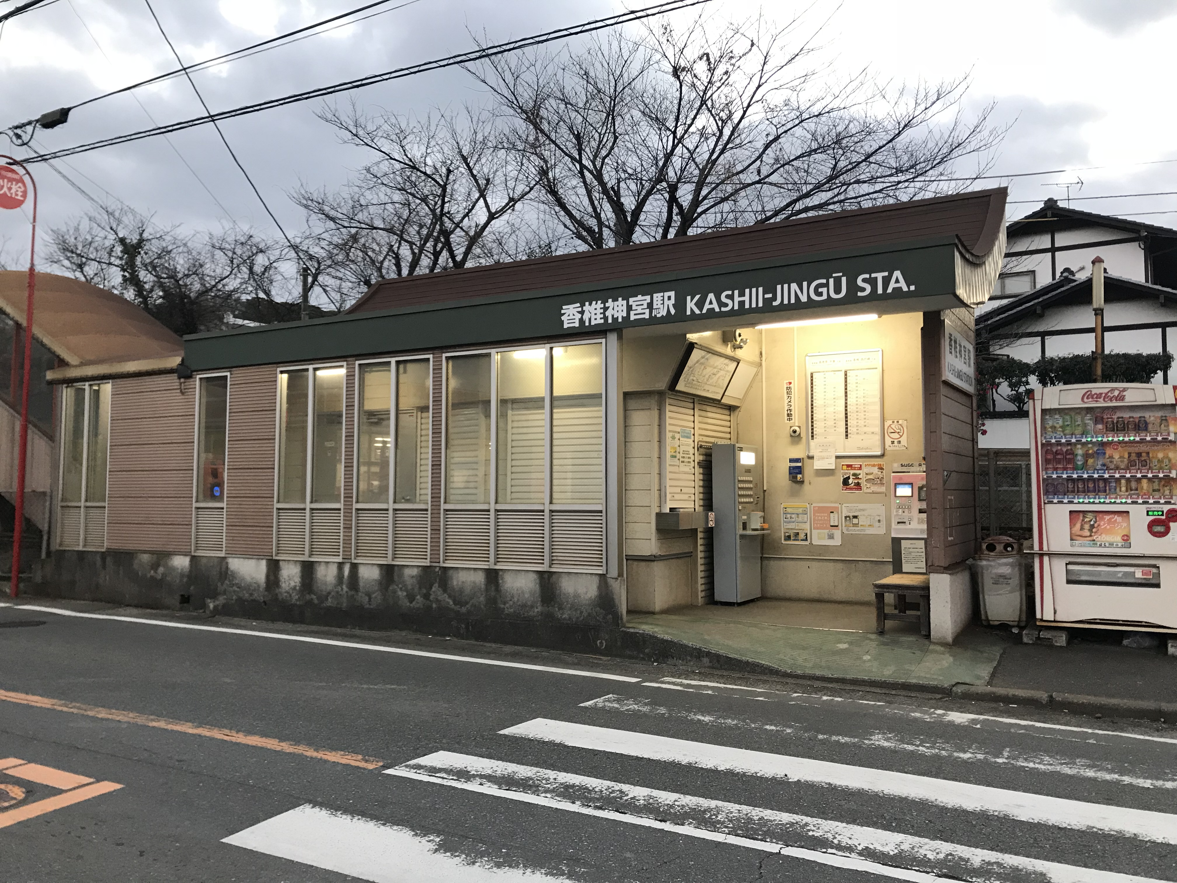 香椎神宮駅駅舎